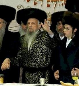 רבי אליעזר הגר זצוק"ל מסערט-ויז'ניץ